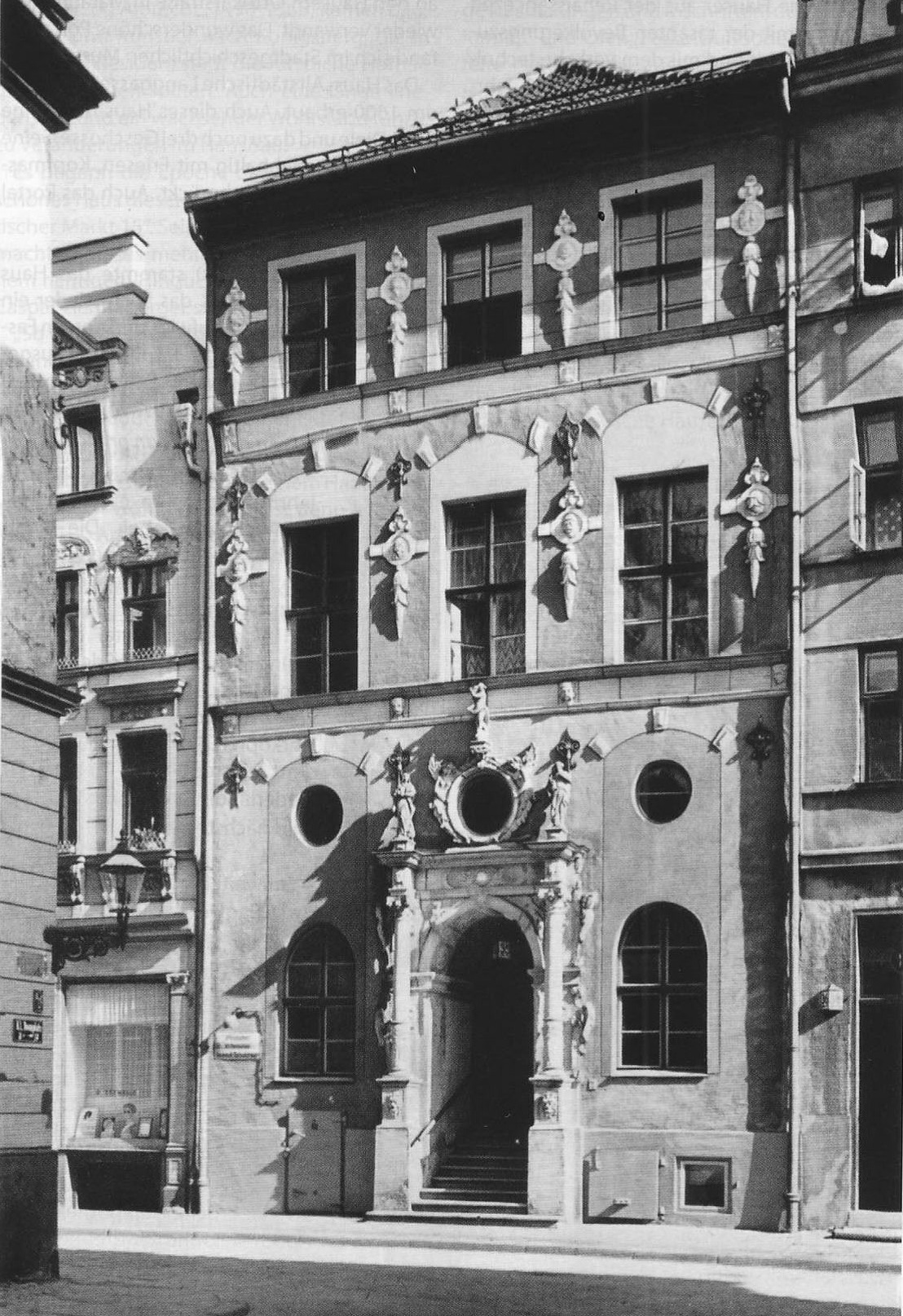 Das 1711 im Stil der Niederländischen Renaissance gebaute v. der Groebensche Stipendienhaus wurde 1889 vom Corps Masovia als erstes Verbindungshaus in Königsberg gekauft.